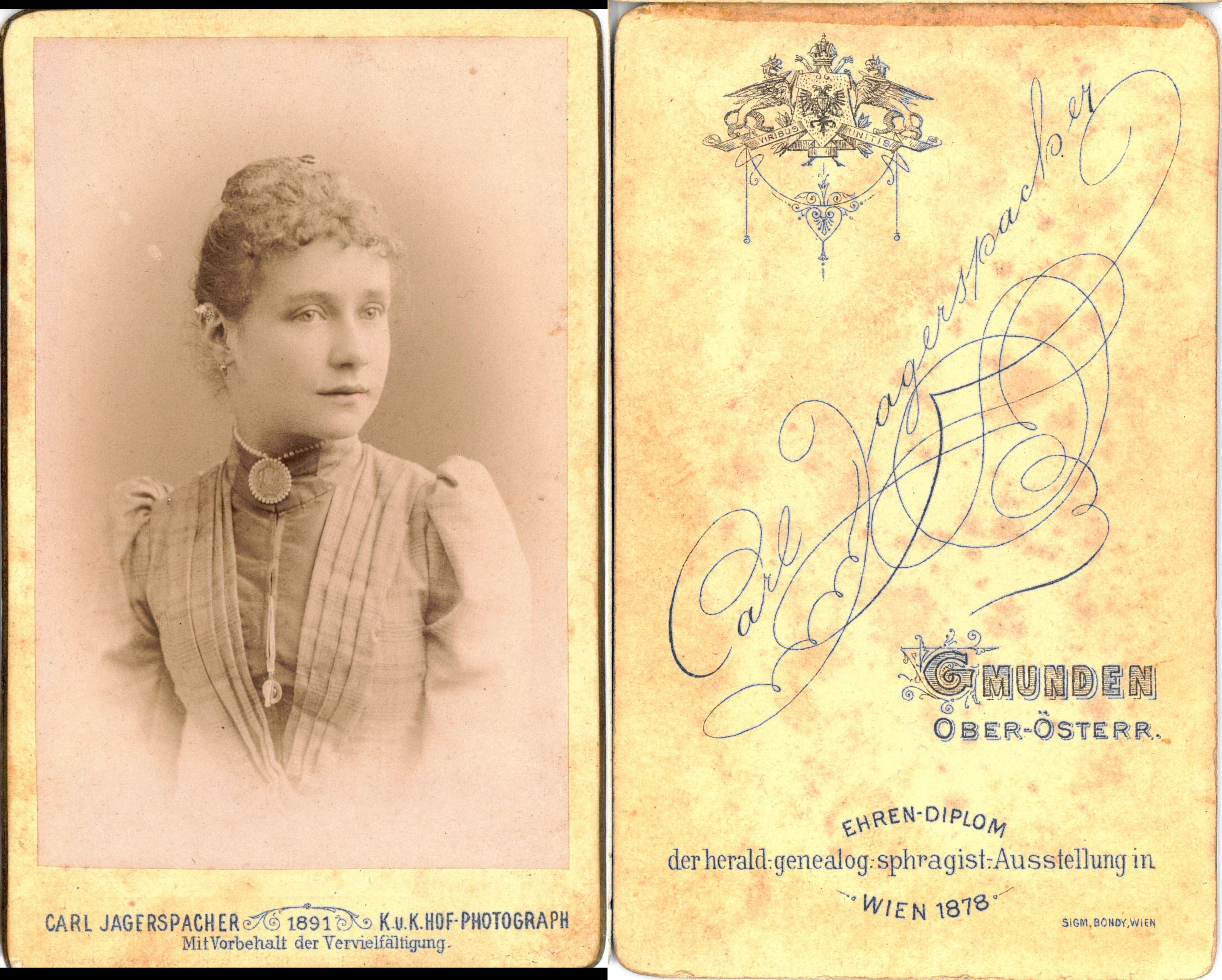 Visitenkartenportrait Foto unbekannt Carl Jagerspacher, K&K Hof-Photograph Gmunden, Oberösterreich.